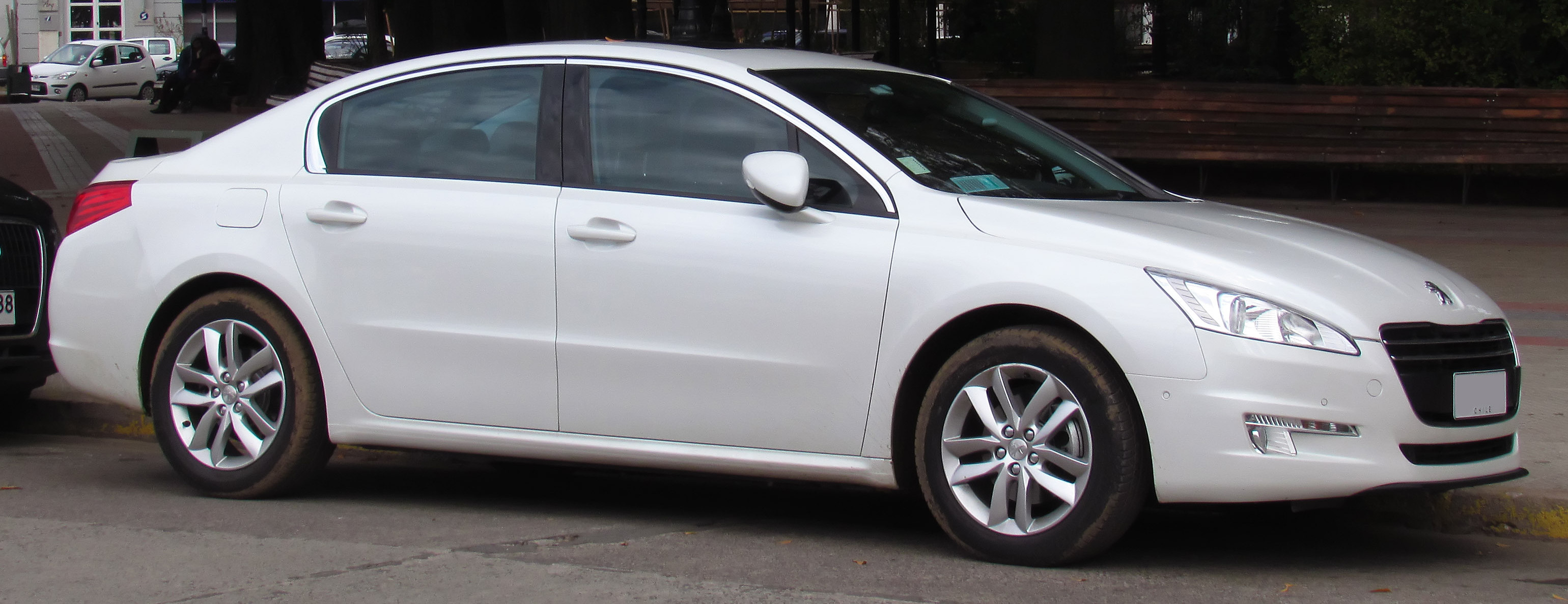 Peugeot 508 2.0 HDi Allure 2014